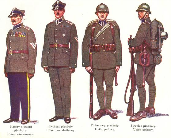 1935 piechota II RP